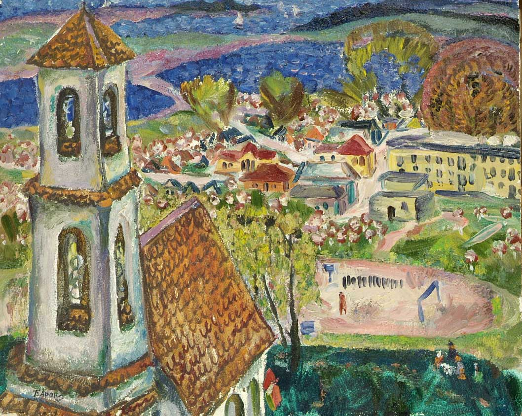 Борис Аракчеев, 9 МАЯ, ЗАСЛАВЛЬ, 1975 год, картон, масло, 35 х 50 см.